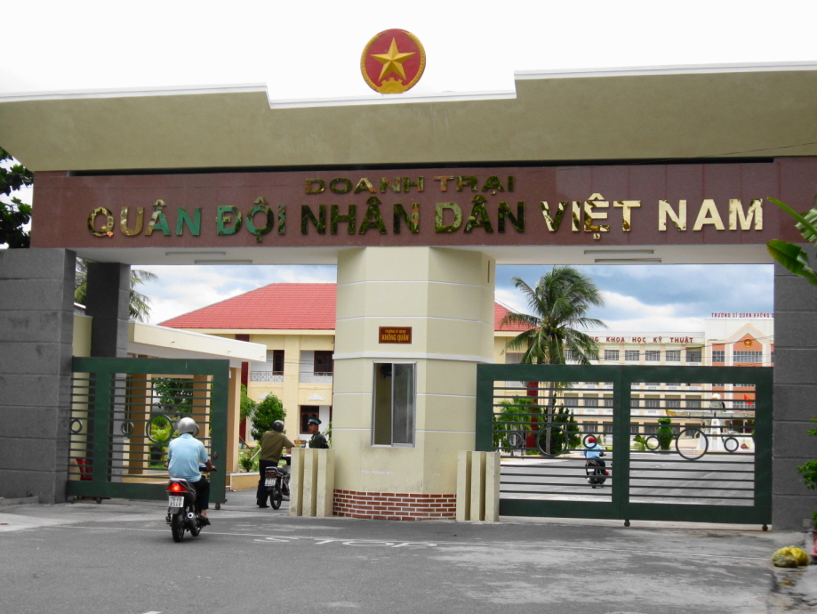 Главные ворота учебной базы Вьетнамской народной армии на территории бывшей американской авиабазы Нячанг. Ныне это учебная лётная база, которая тянется от самого центра Нячанга. На фото - главные ворота с надписью "Казармы Вьетнамской народной армии". Планируется перевод учебной базы в Камрань и застройка территории гражданскими объектами.